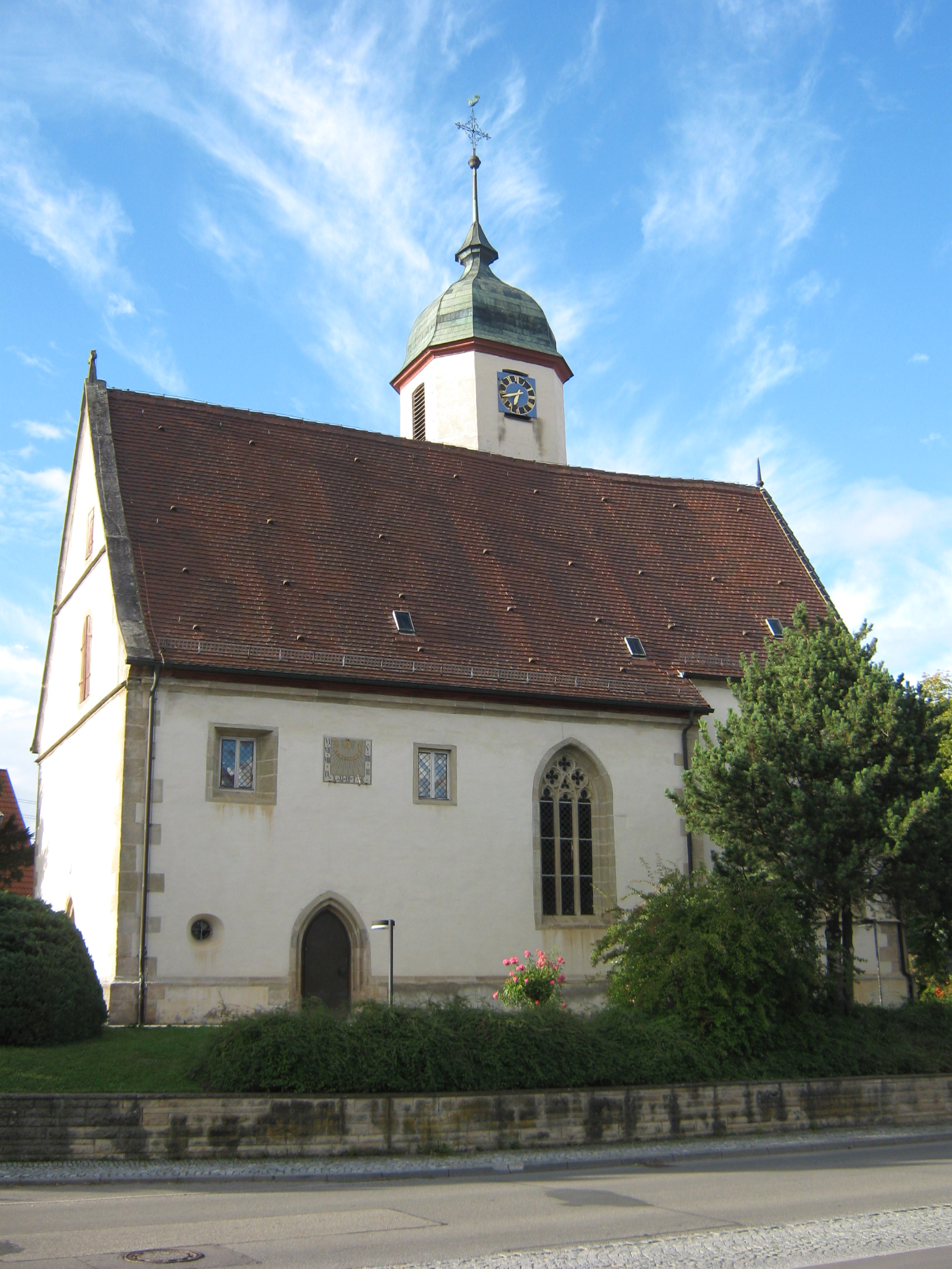 Die evangelische Peterskirche an der Hauptstraße im Ortsteil Remmingsheim bei Neustetten im Landkreis Tübingen wurde bereits im Jahre 900 erwähnt.